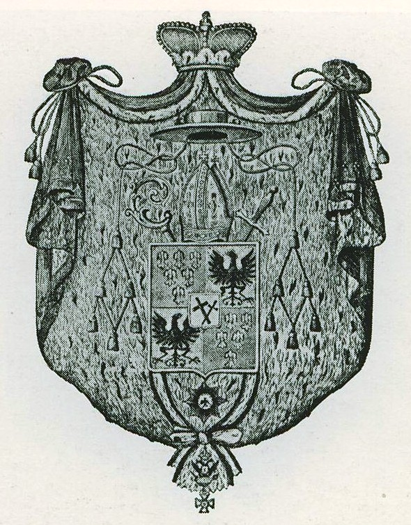 Wappen des Breslauer Fürstbischofs Heinrich Förster